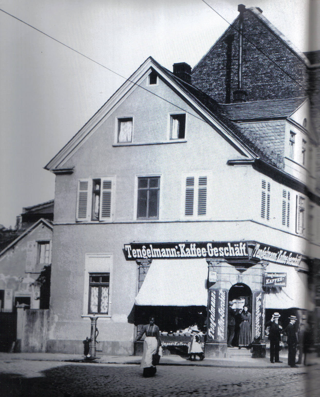 Frankfurt-Bockenheim, Leipziger Straße Ecke Landgrafenstraße, Tengelmann Kaffeegeschäft, 1905